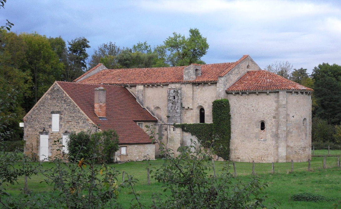 Prieuré d'Aubeterre (Classé) .